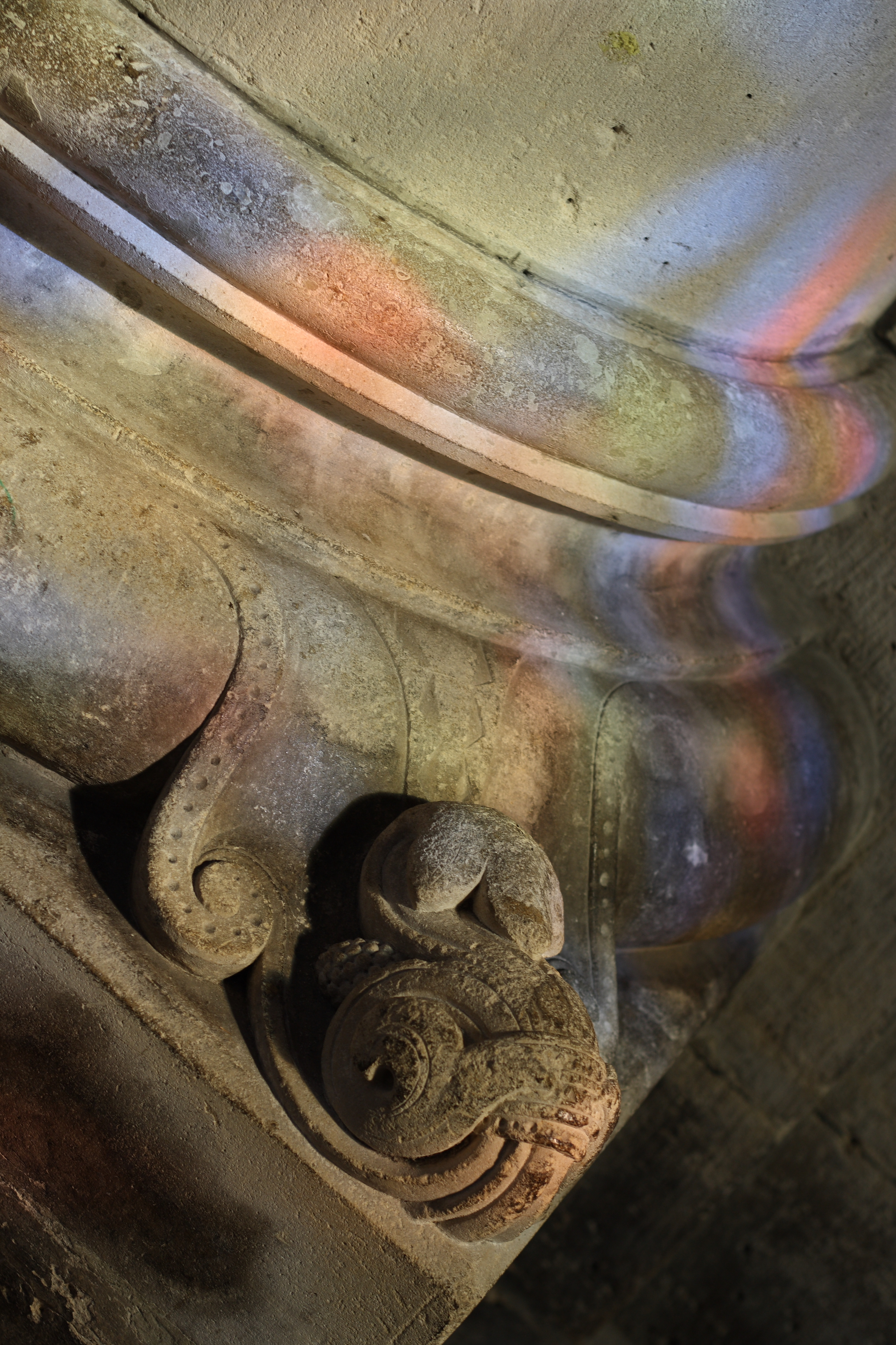 katholische Pfarrkirche Saint-Clodoald in Saint-Cloud, Säulenbasis mit Eckblatt